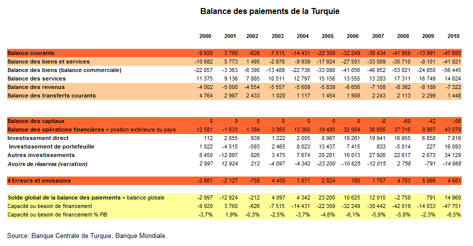 Balance des paiements de la Turquie - Source: Banque Centrale de Turquie.; courante Balance des biens et services Balance des biens (balance commerciale) Balance des services Balance des revenus Balance des transferts courants 8alance des capitaux Balance des opérations financières = postion extérieure du pays Investissement direct Investissement de portefeuille Autres investissements Avoirs de réserves (variation) 4 Erreurs et omissions Solde global de la balance des paiements = balance globale Capacié ou besom de financement Capacté ou besoin de financement % Pfi